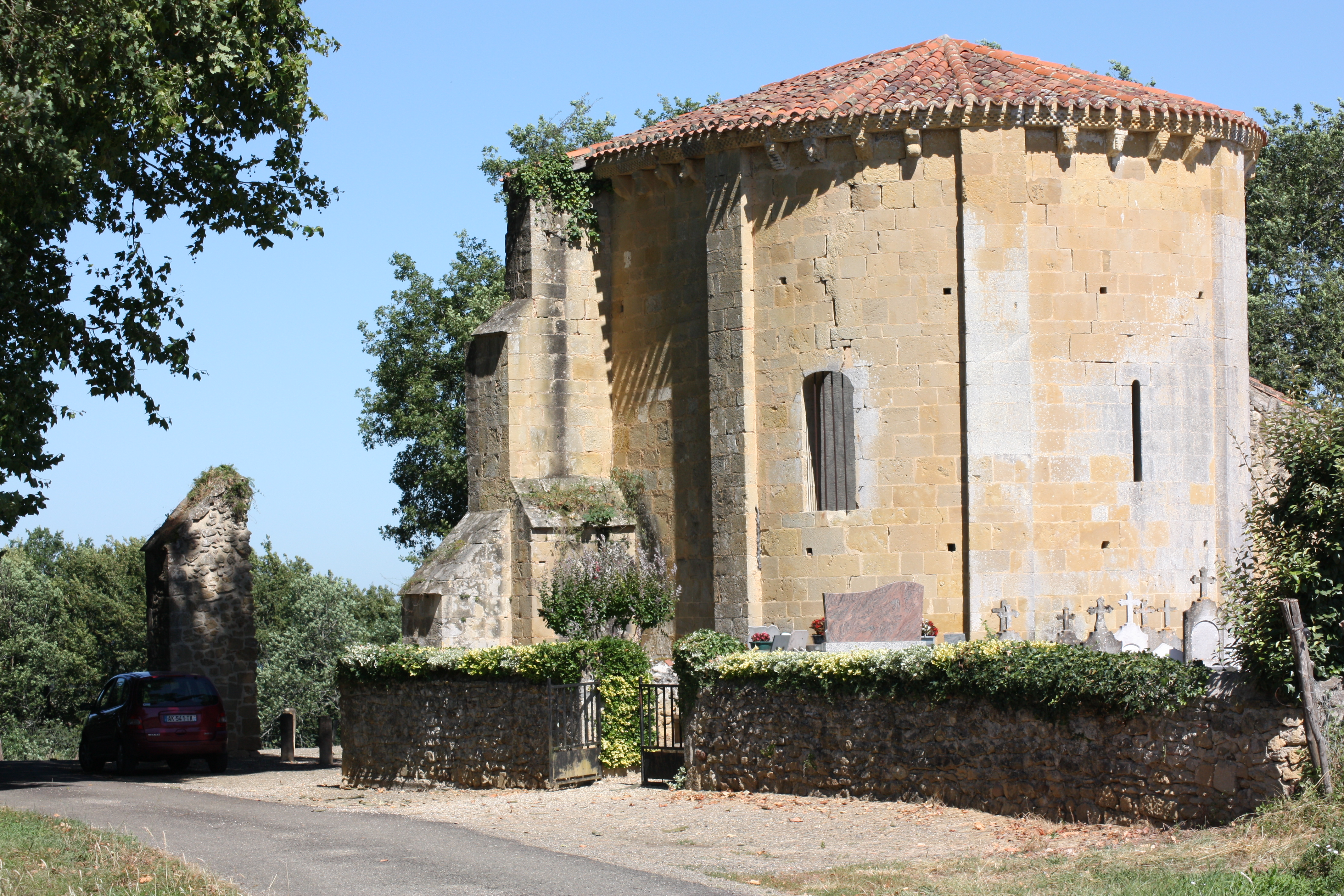 Payros-Cazautets - Ancienne église Notre-Dame